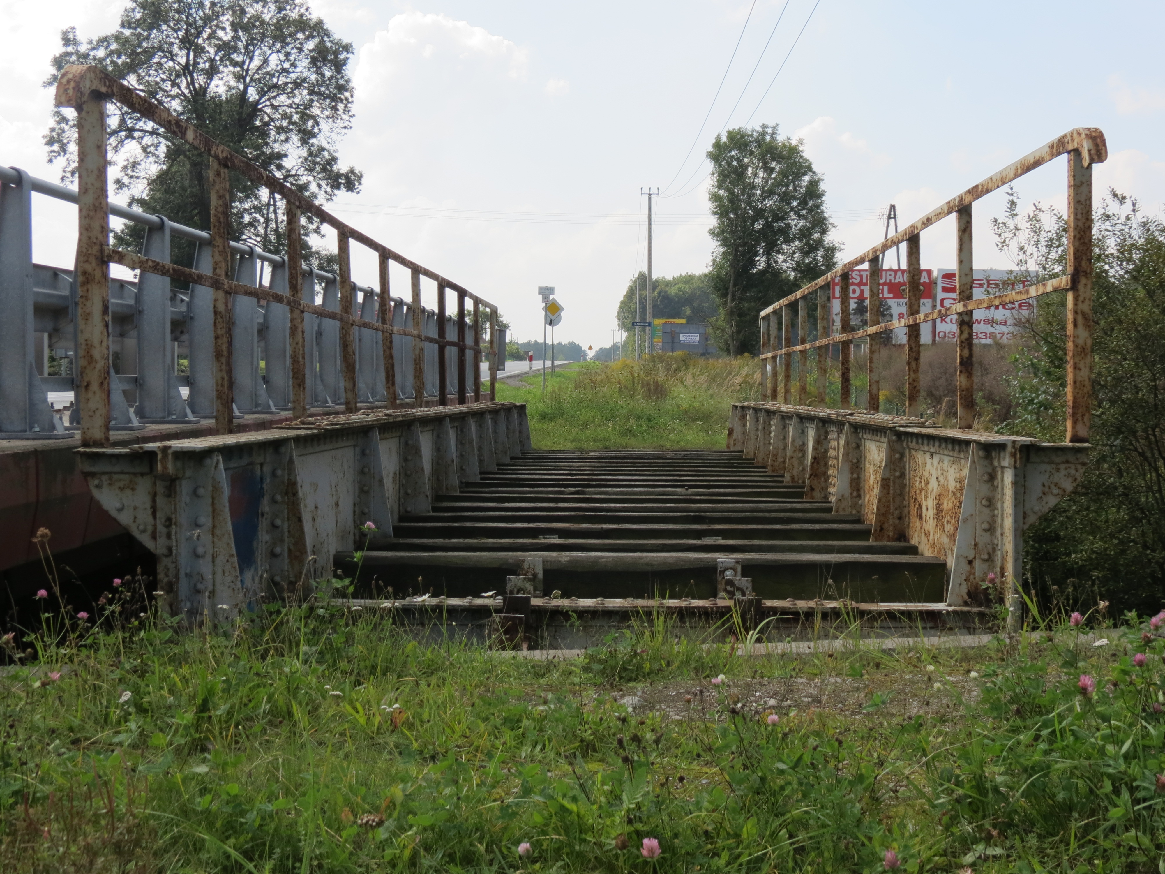 Nieborowice, torowisko z mostami i przepustami, XIX/XX w. (na linii kolejki wąskotorowej Bytom-Karb-Markowice (odcinek Nieborowice-Pilchowice))